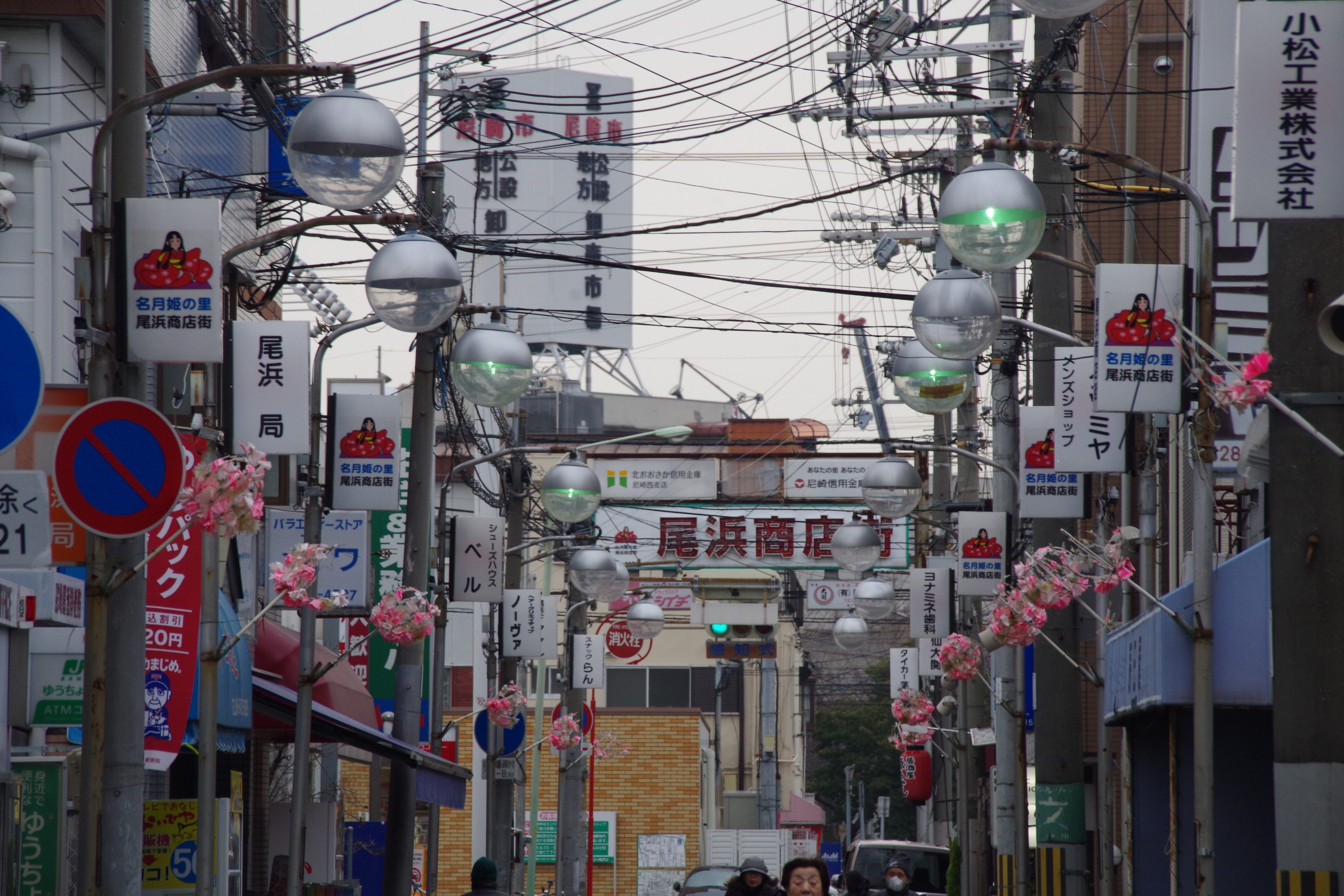 兵庫県尼崎市にある尾浜商店街